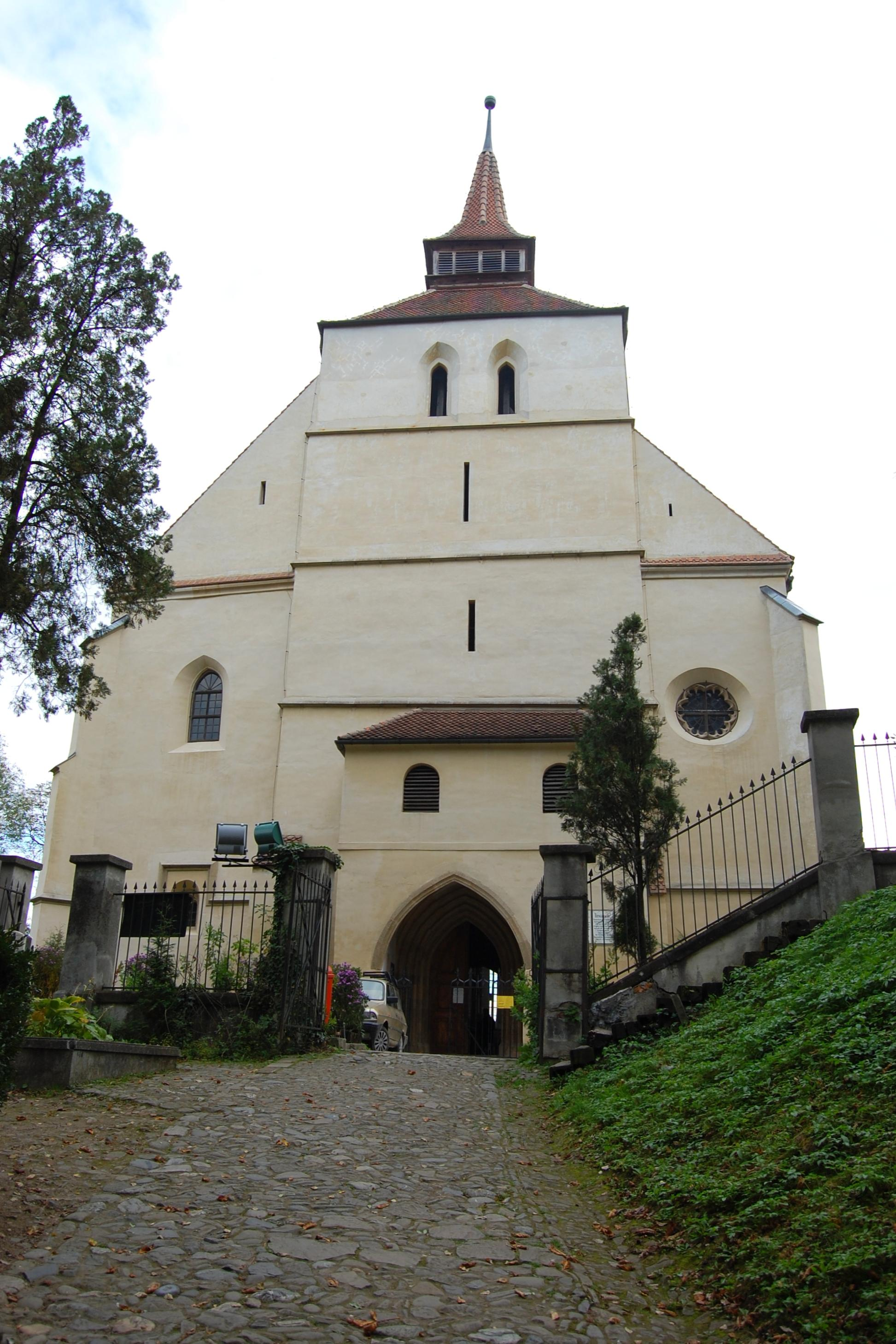 Segesvár - Felsőváros - Evangélikus vártemplom